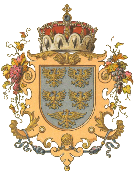 Wappen des Erzherzogtums Österreich unter der Enns